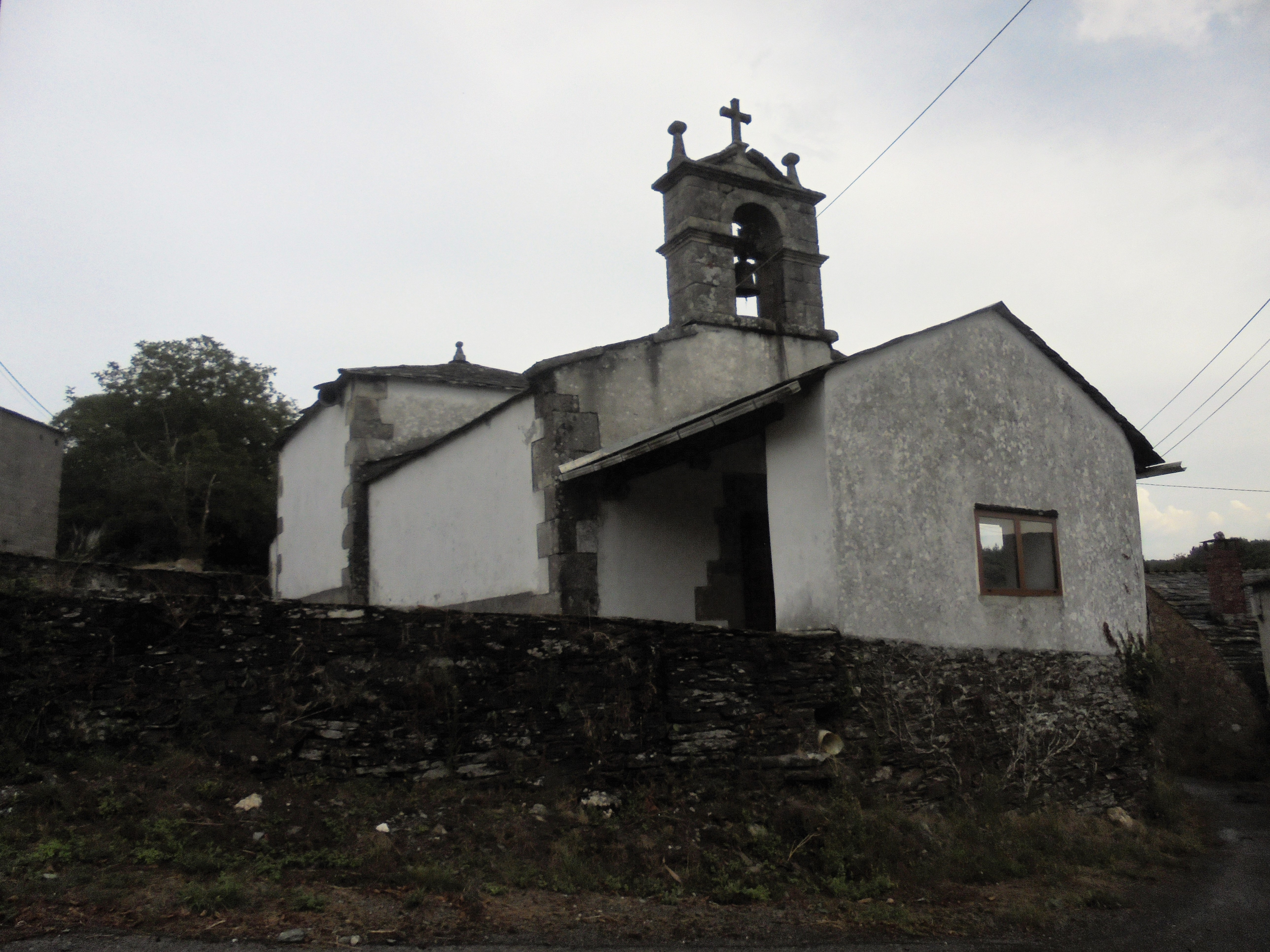 Igrexa parroquial de Arcos ( Pol)